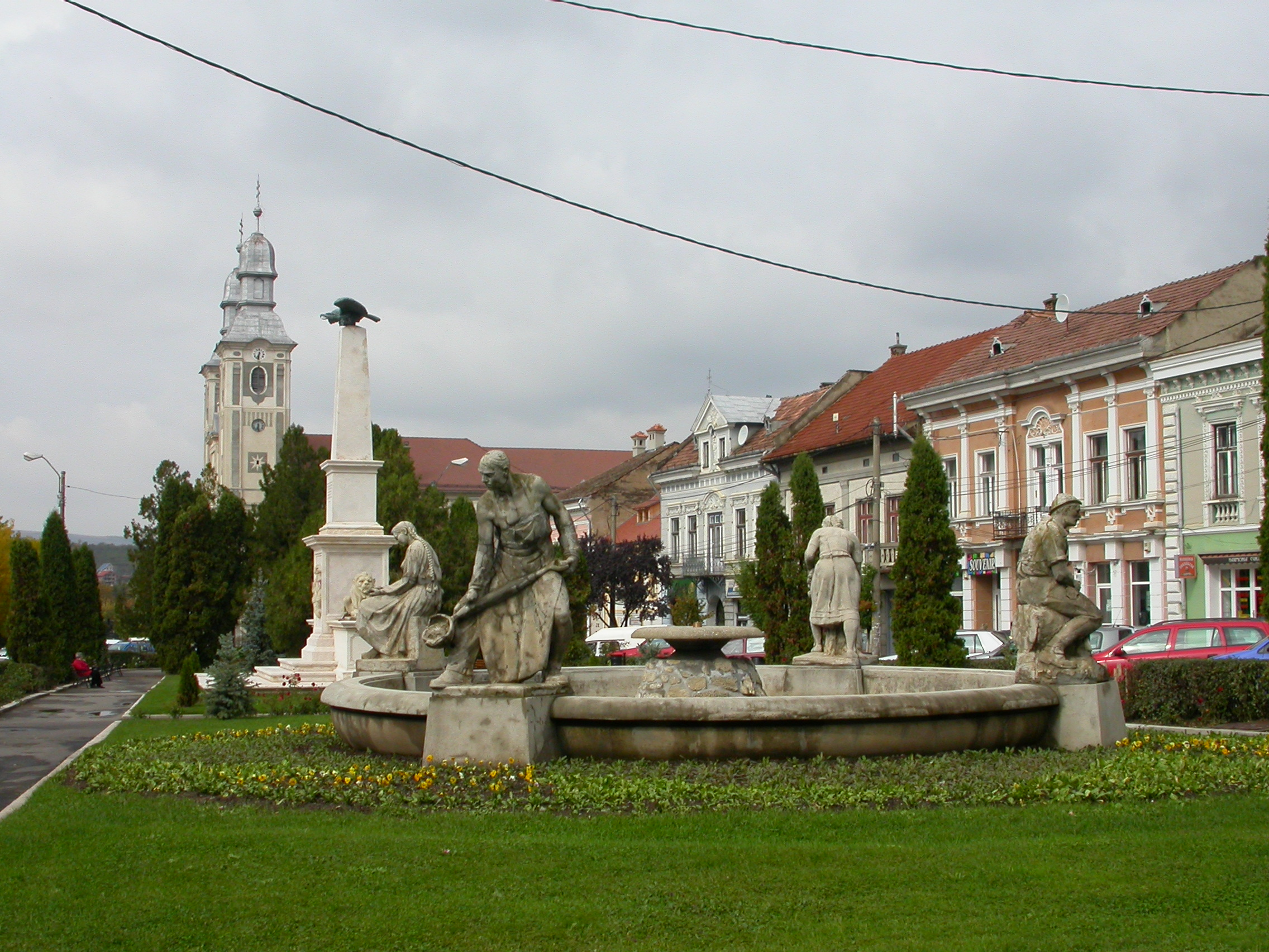 Ansamblul urban "Piața" sec. XVIII - XIX